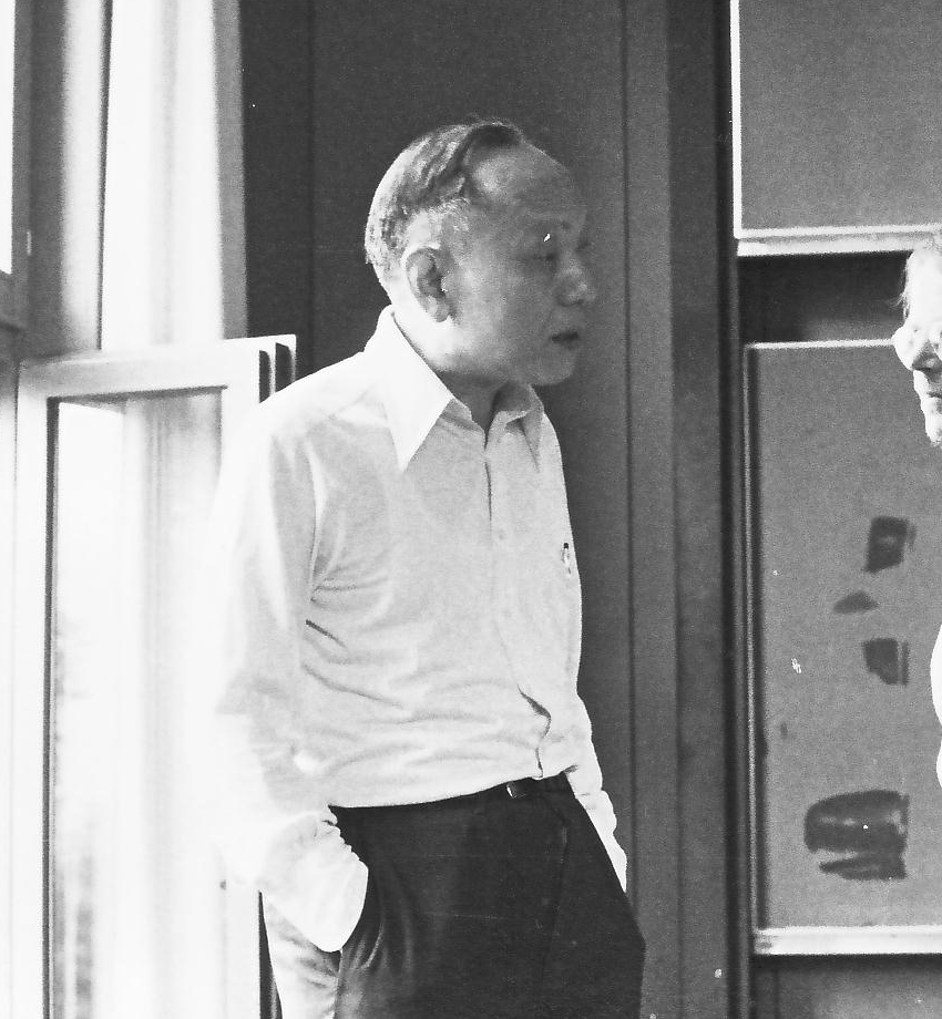 Den kinesisk-amerikanske matematiker Chern.